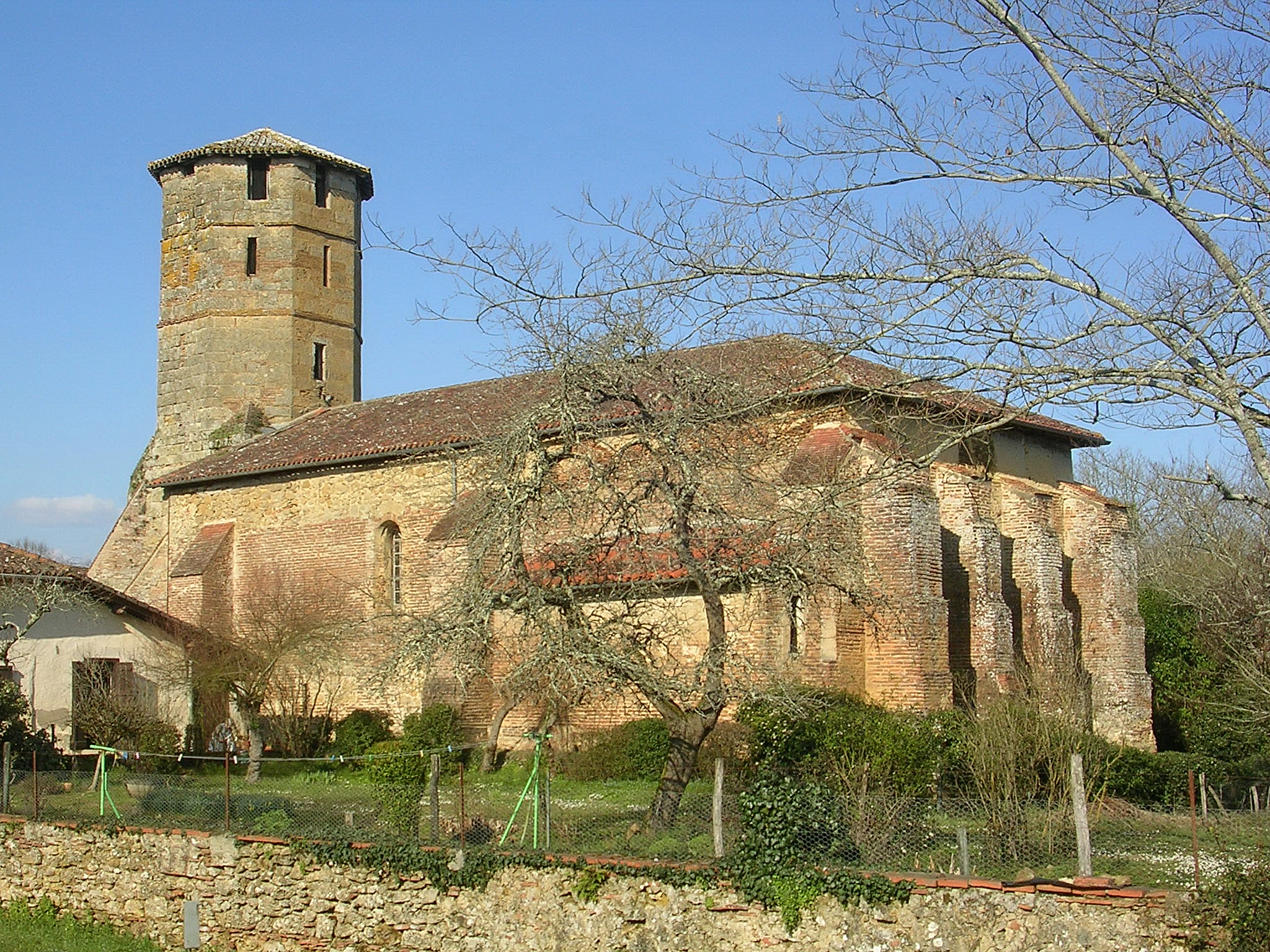 Église Saint-Laurent de Montégut